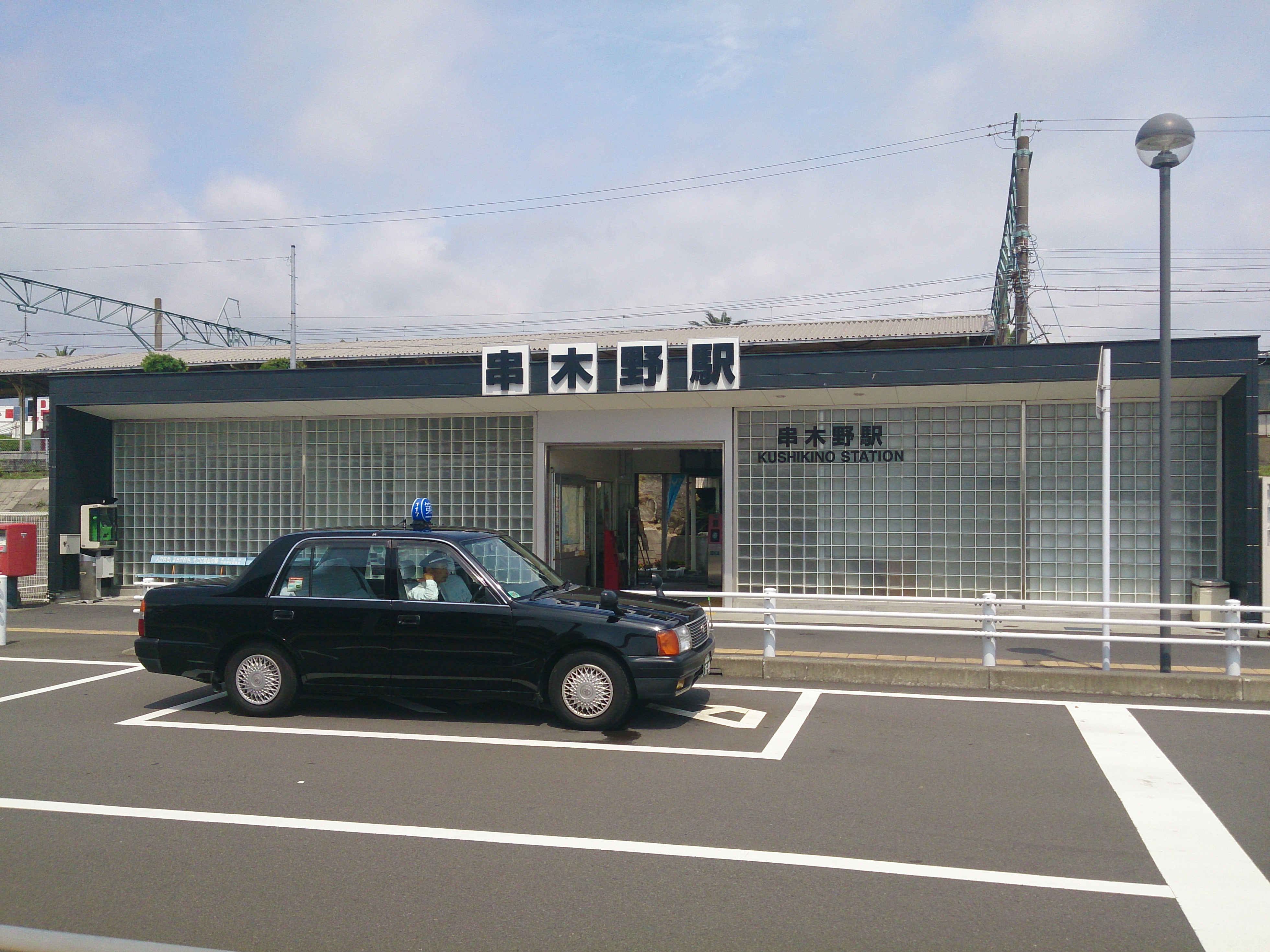 串木野駅駅舎